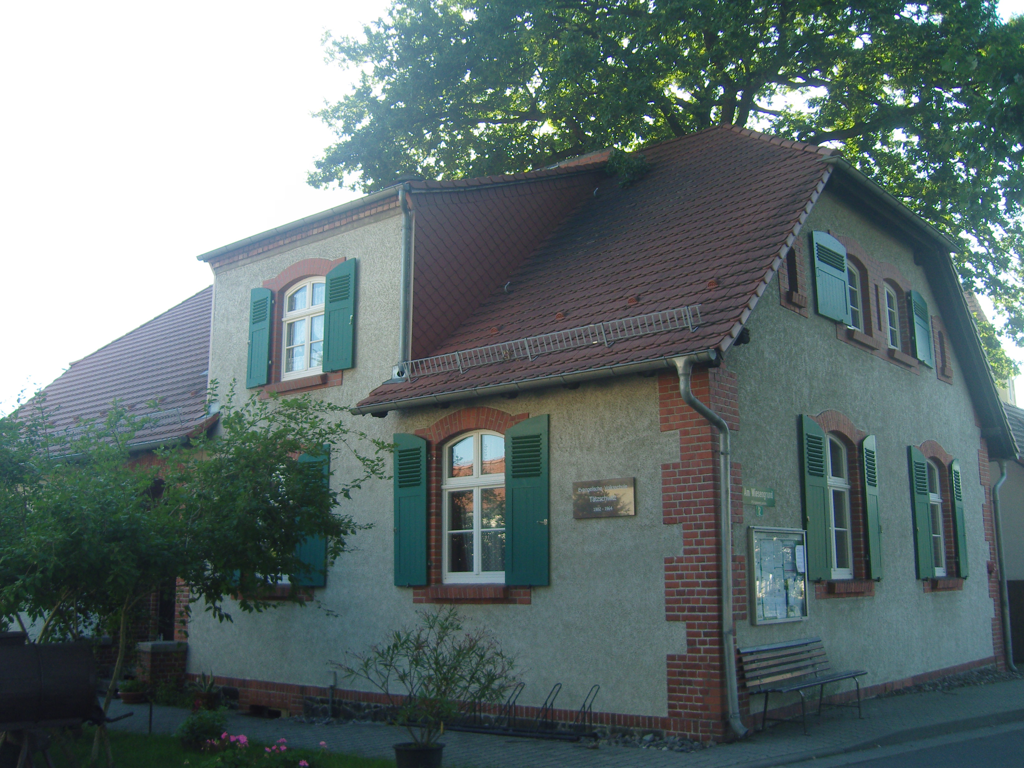 Schulstube in Tätzschwitz Hornjoserbsce: Stara Ptačanska šula, gmejna Halštrowska hola